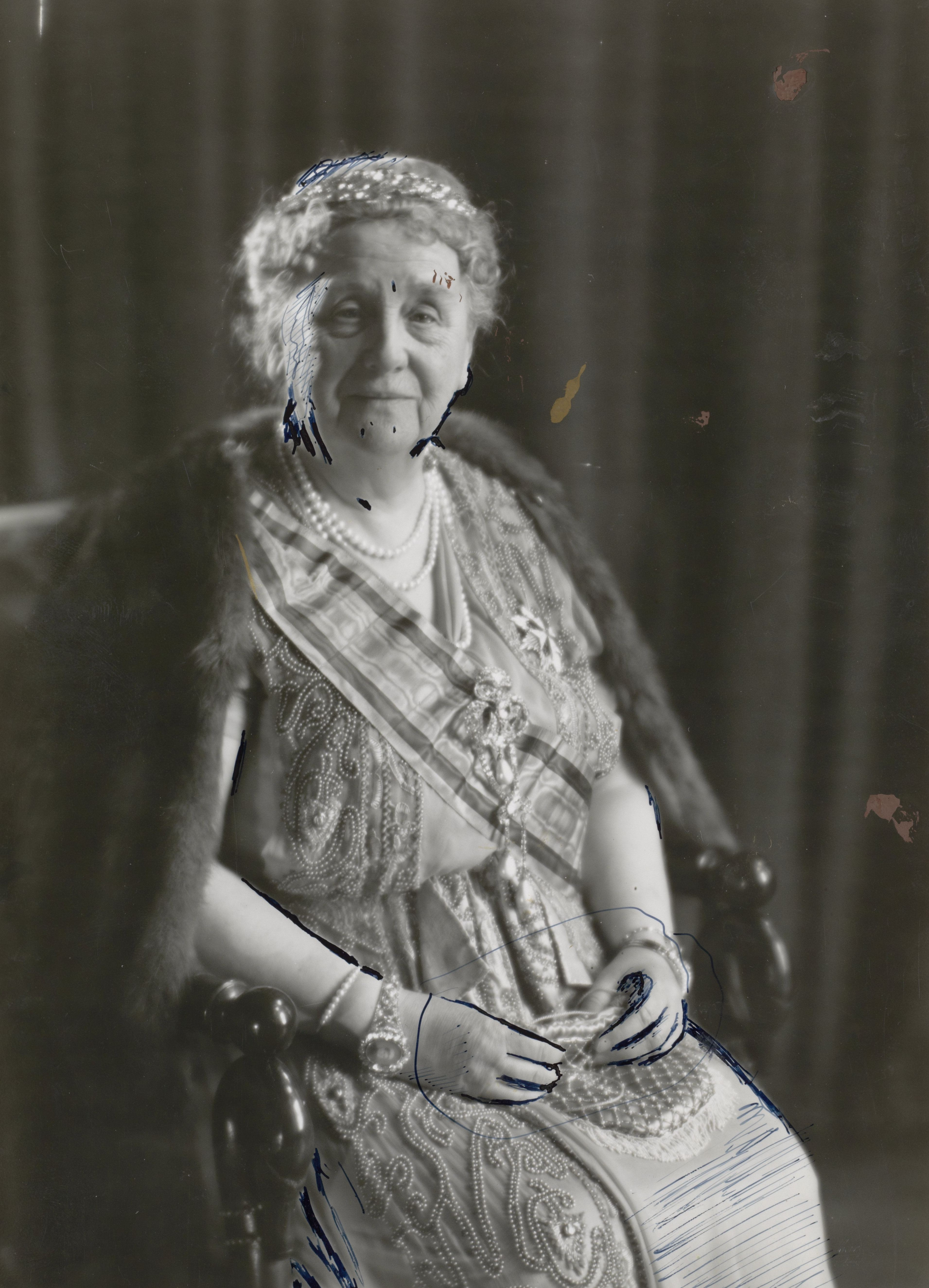 IdentificatieTitel(s): Koningin Wilhelmina poseert met de WillemsordeCollectie Merkelbach, portretten van koningin Wilhelmina (serietitel)Objecttype: foto Objectnummer: NG-1972-11-94Opschriften / Merken: (Op afdruk de volgende stempels: blindstempel r.o., Copyright: Publiek domein